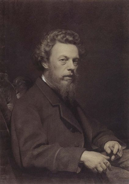 И. Н. Крамской. Портрет А. Г. Горавского. 1867. Бумага, соус, белила. 89 х 62,8